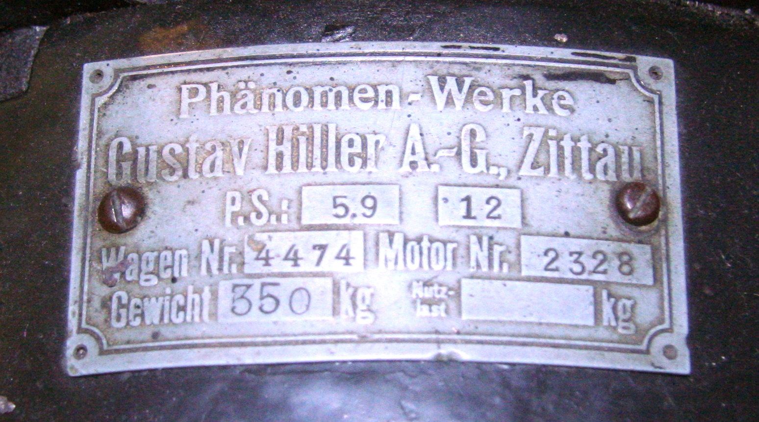 Typenschild von Phänomobil Zn, 4-Zylinder Motor, 12 PS, 1548 cm³, Höchstgeschwindigkeit 65 km/h, Gewicht 570 kg, Baujahr 1921 im Museum für sächsische Fahrzeuge in Chemnitz.